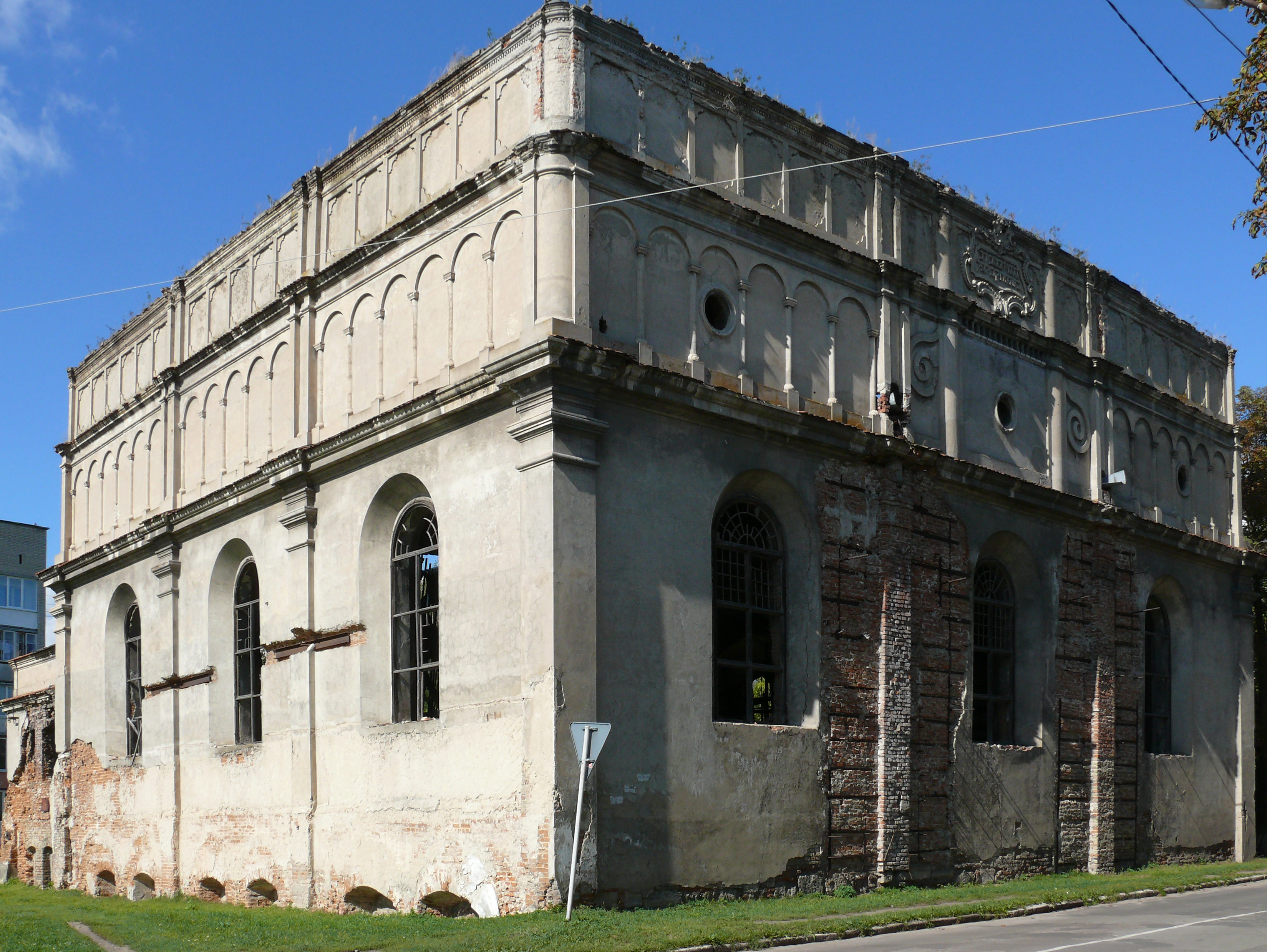 Синагога (мур.) 1742 р. Броди, вул.Гончарська, 12